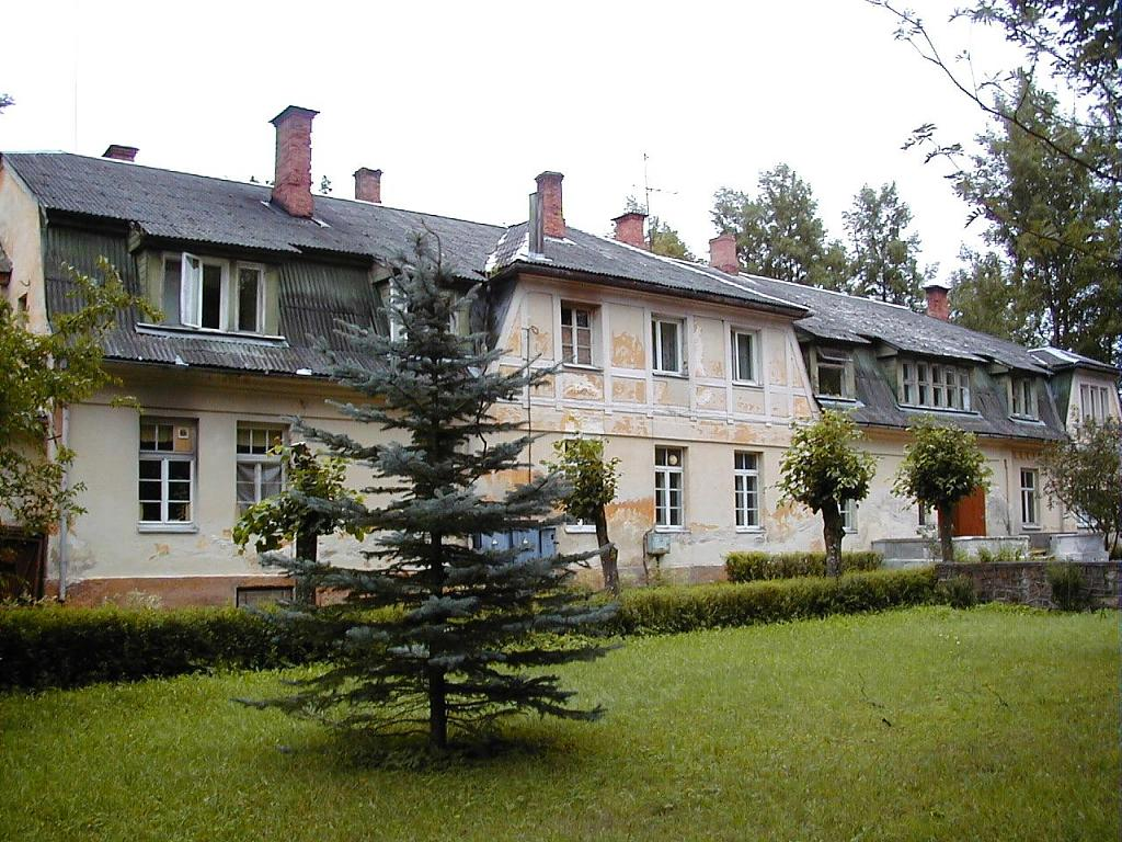 Apes muiža 2001-08-04. 2005. gadā cieta ugunsgrēkā.